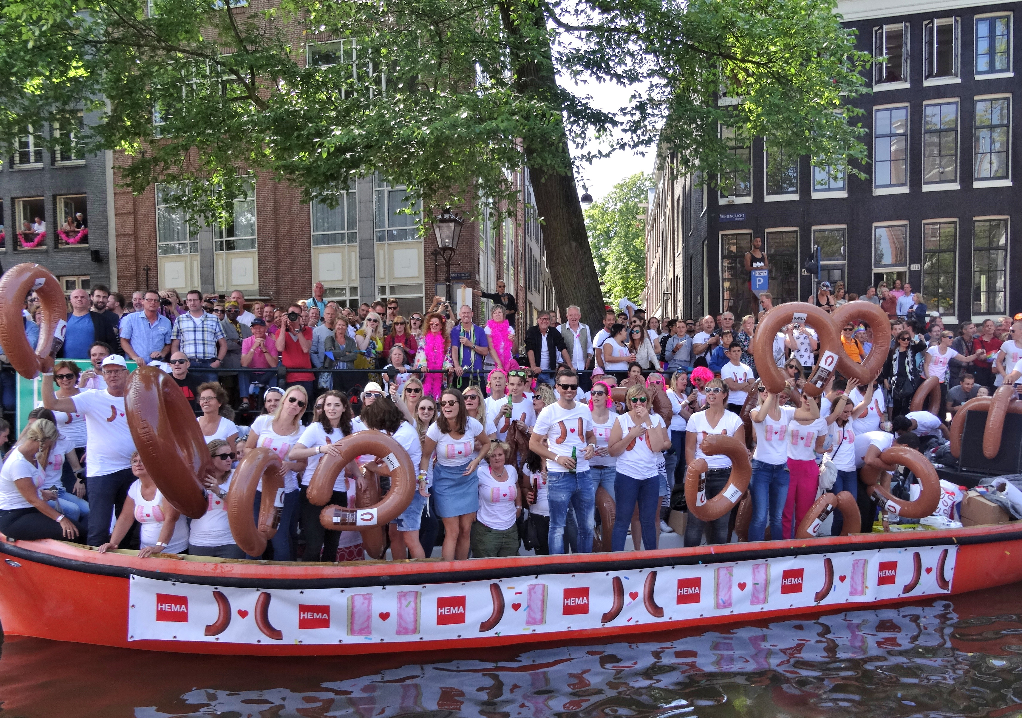 Impression of the Canal Parade at EuroPride in Amsterdam 2016